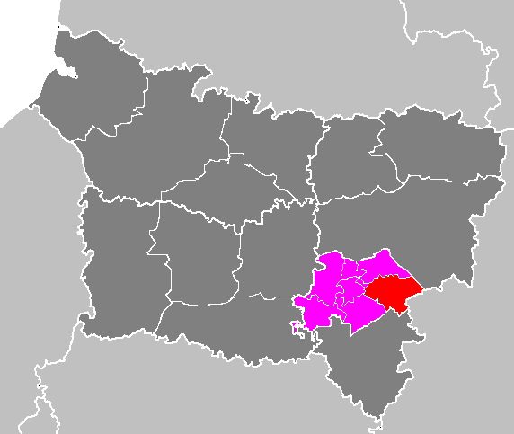 Maps of arrondissements and cantons of France: Arrondissement de Soissons - Canton de Braine.PNG